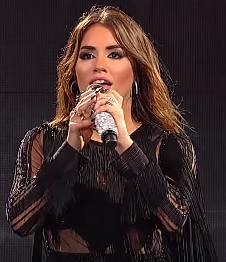 Lali cantando en 2017